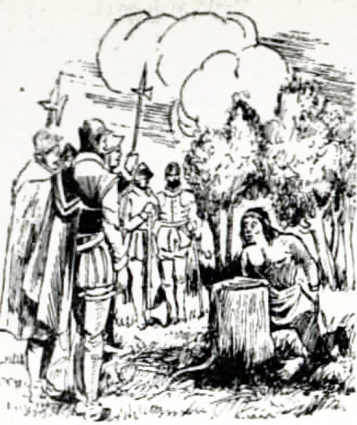 Ilustración que representa al Toqui Mapuche Galvarino, al momento de cortar sus manos por los españoles.